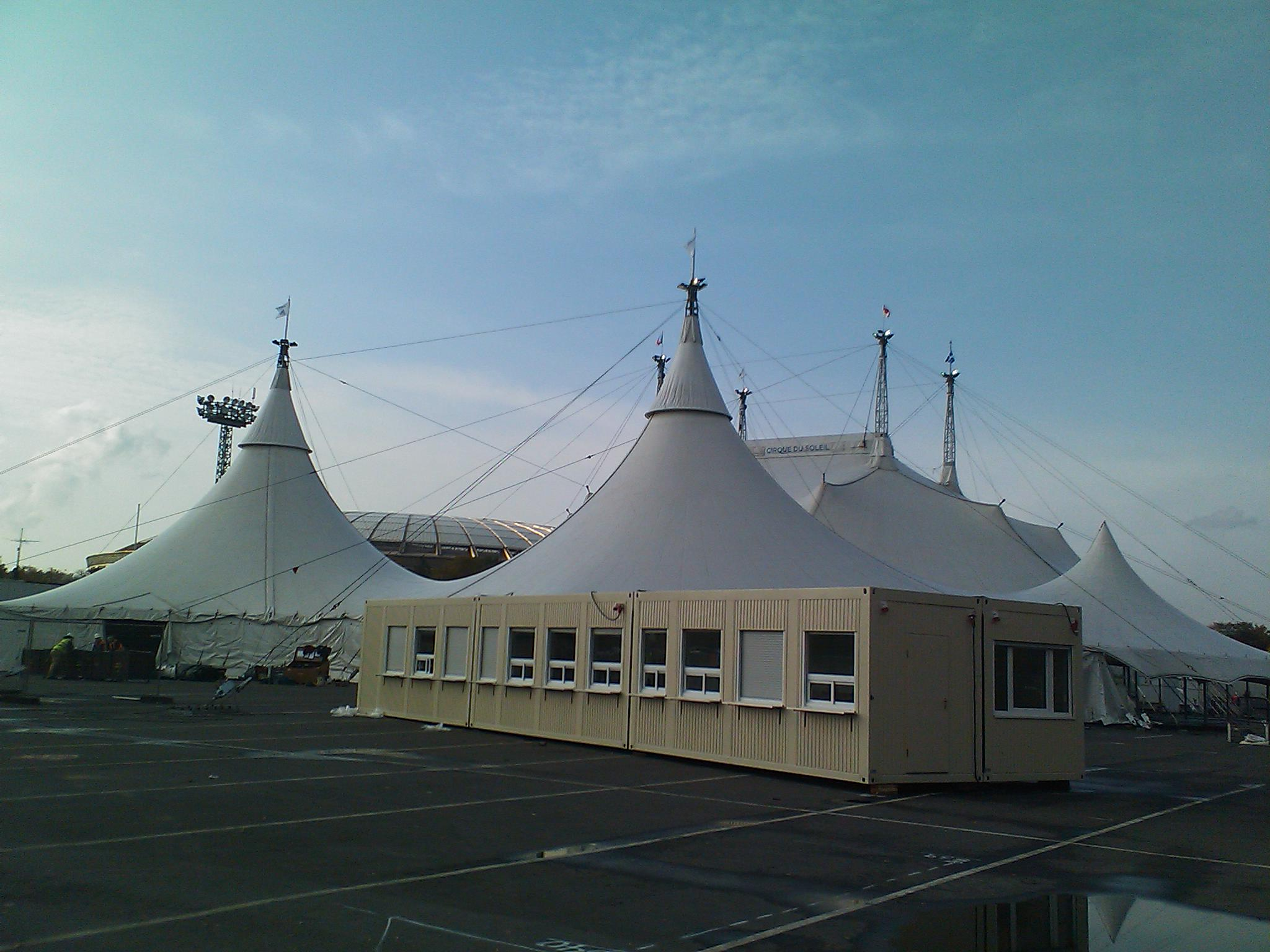 Гастроли всемирно известного цирка